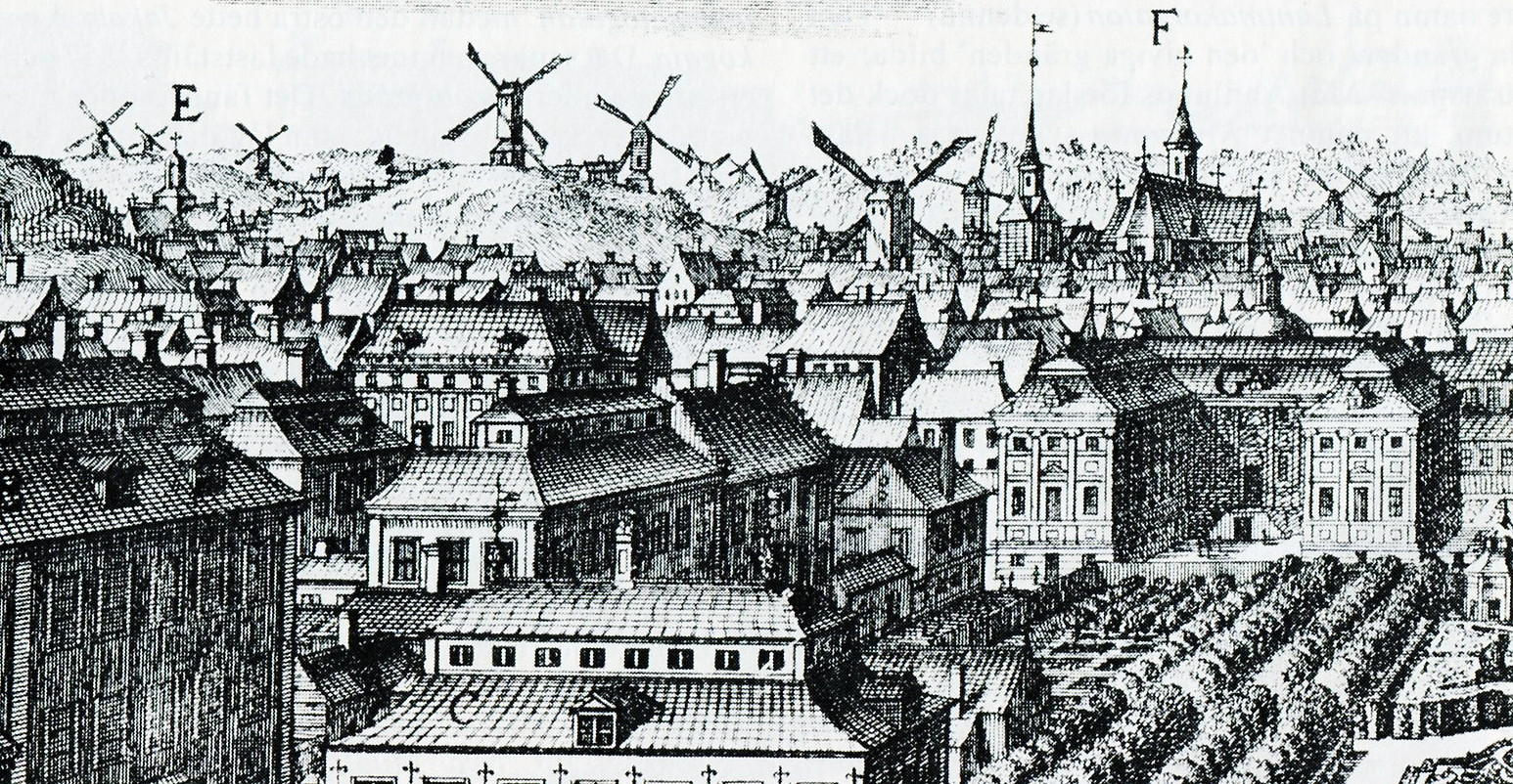 Del av Brunkebergsåsen med sina väderkvarnar år 1700